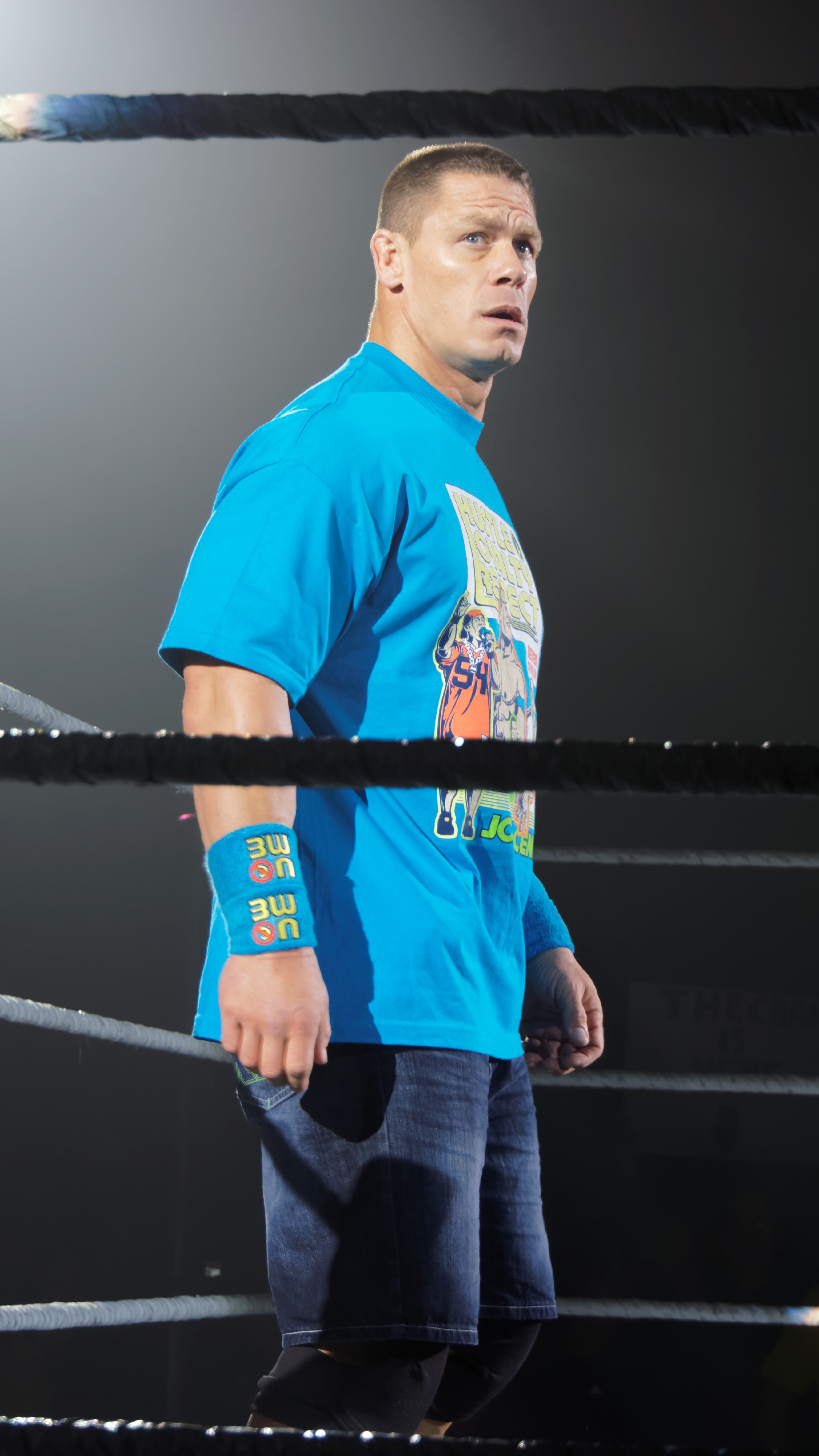 WWE Live@Lotto Arena - Antwerpen